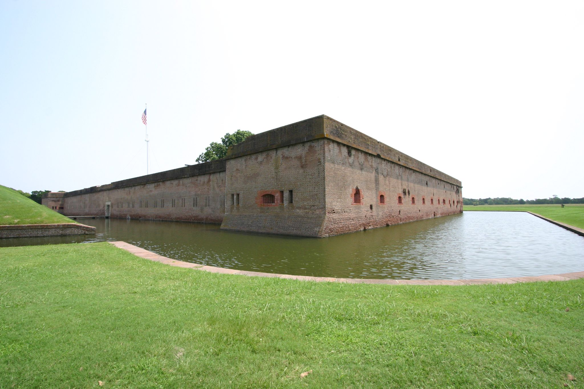 Fort Pulaski, GeorgiaFort Pulaski